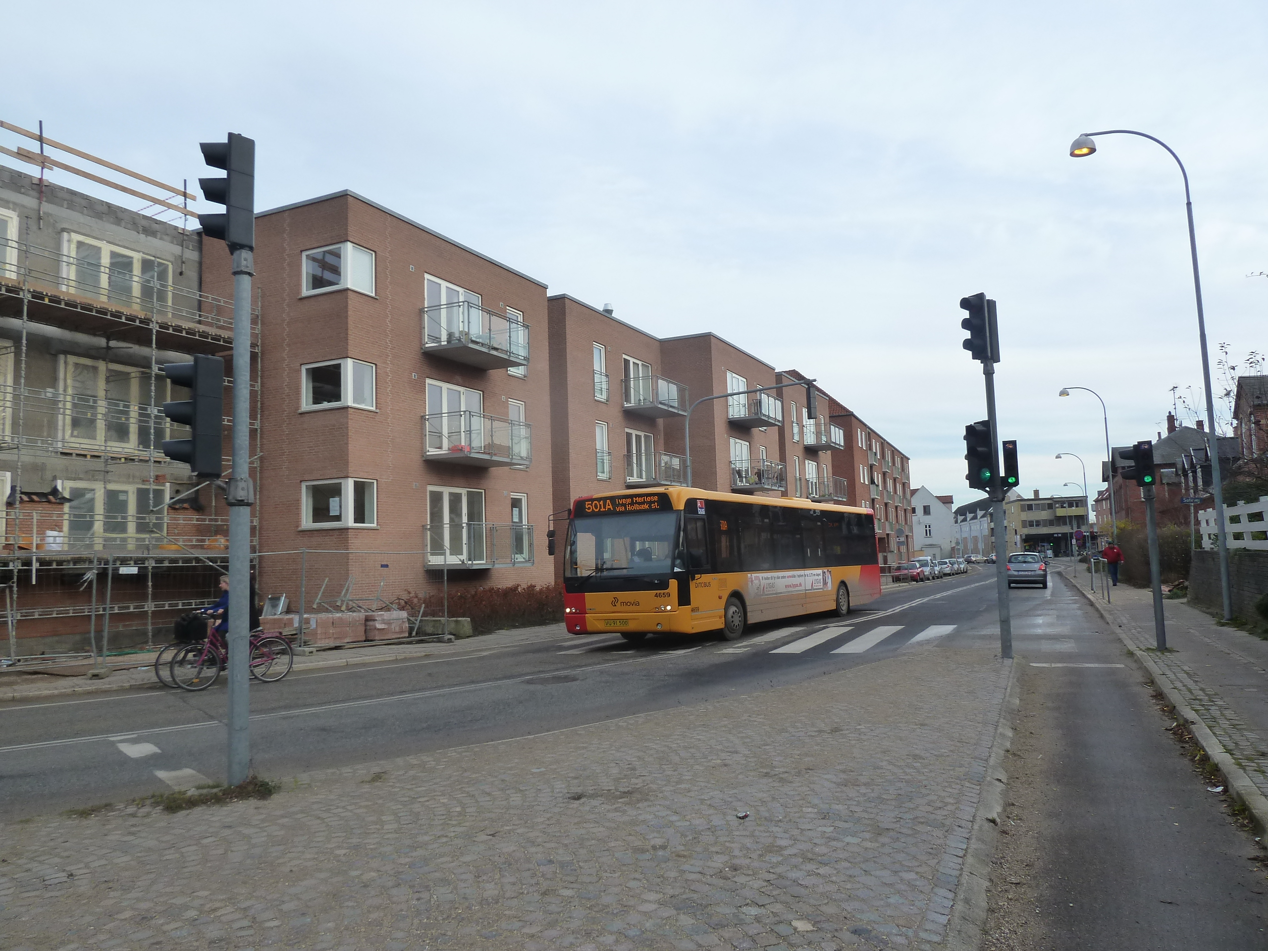 Movia bus line 501A on Kastanievej in Holbæk in Denmark.